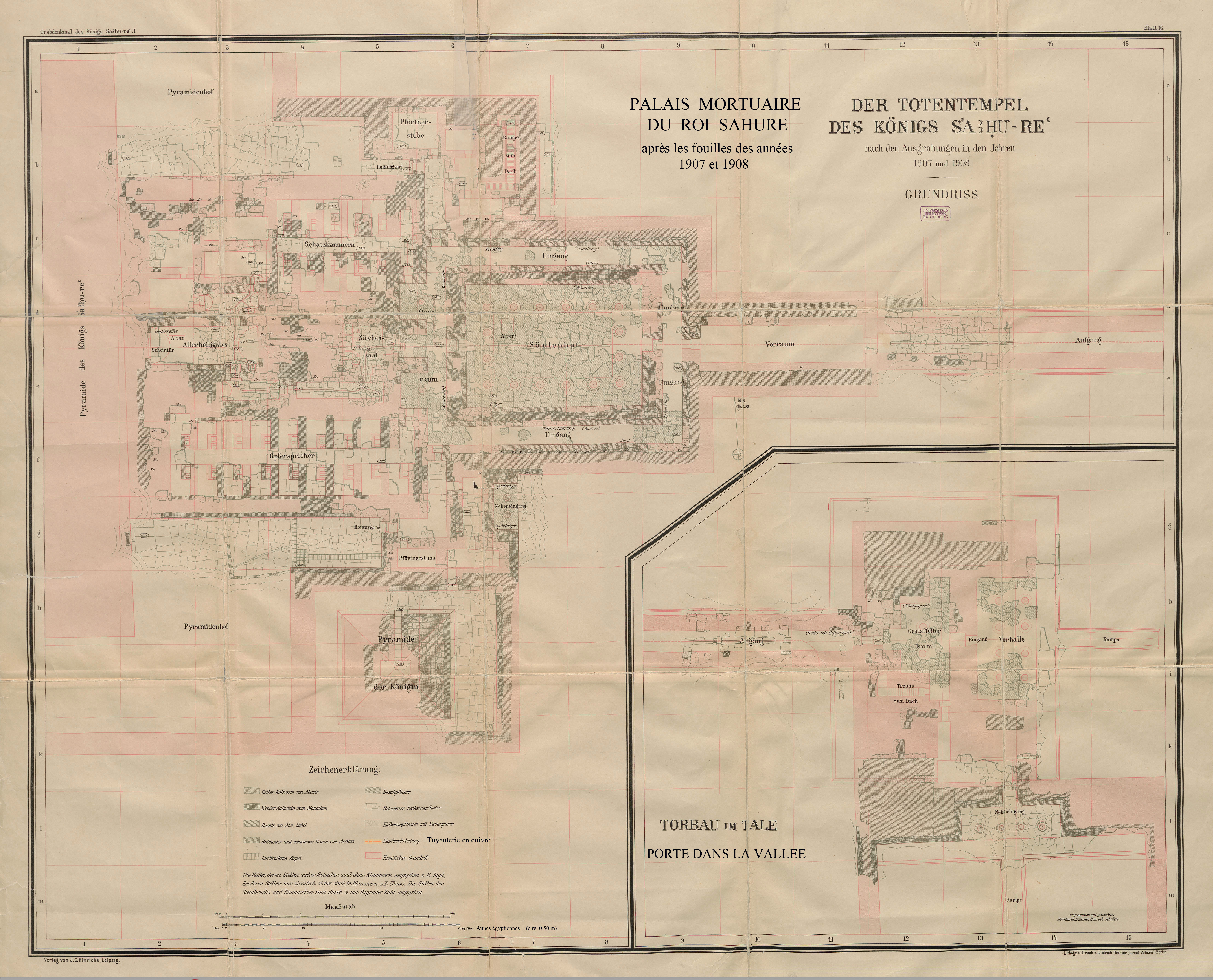 Le monument funéraire du roi Sahuré.